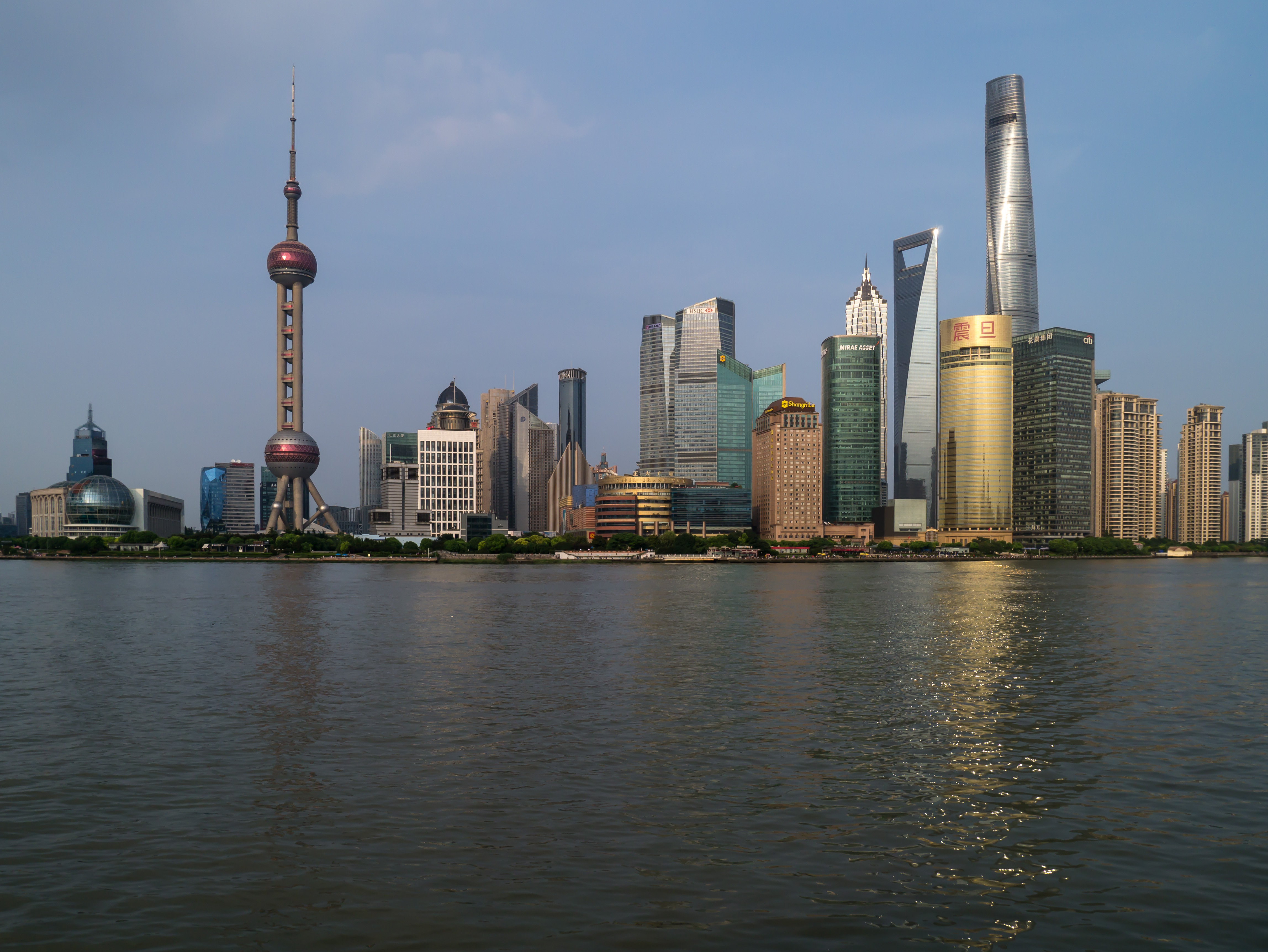 Shanghai, Skyline Pudong am Abend August 2016